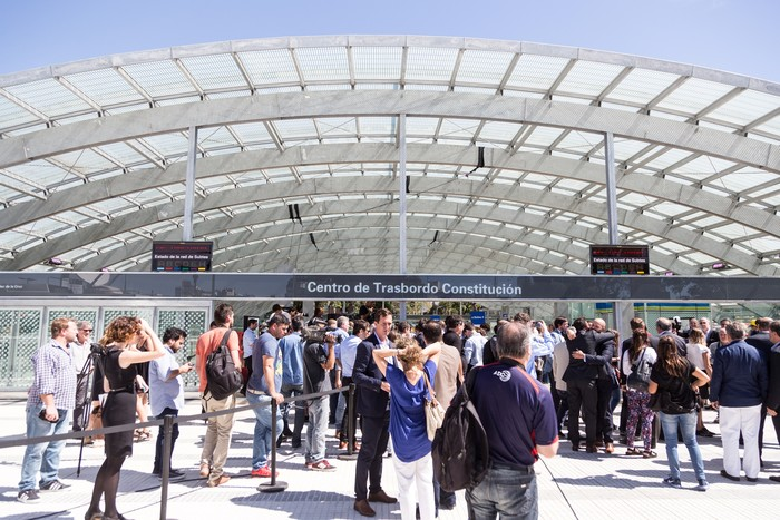 Entrada al Centro de trasbordo Constitución.